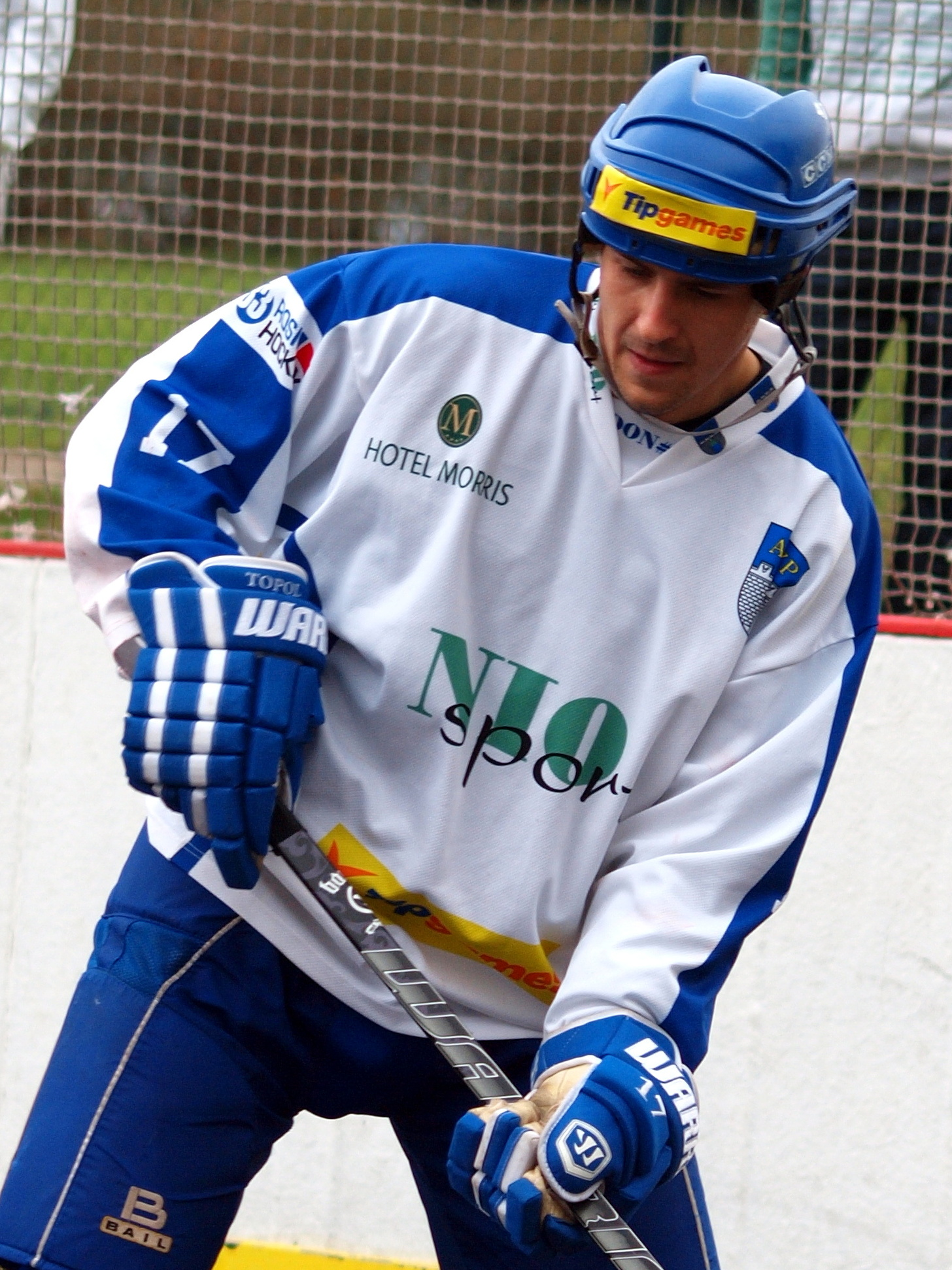 Dvojnásobný mistr světa, čtyřnásobný mistr ČR a vítěz Evropského poháru.